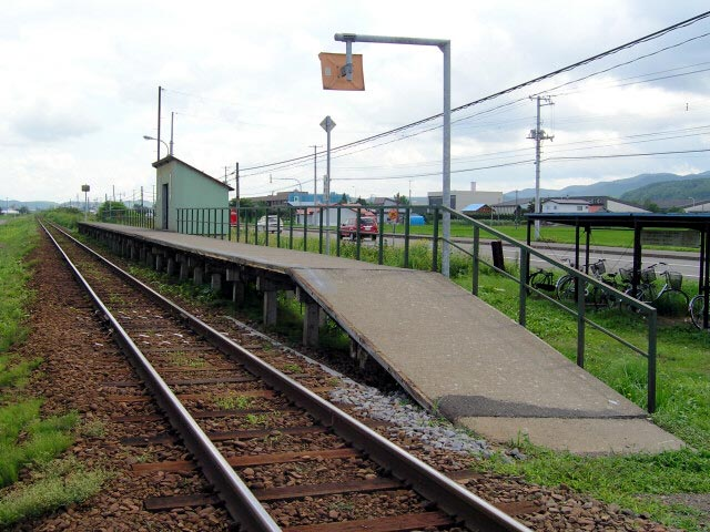 西瑞穂駅全景 撮影場所 西瑞穂駅そば踏切より。 撮影者によるGFDLリリース